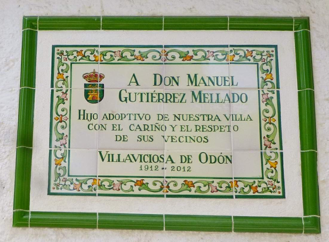 Villaviciosa de Odón (Comunidad de Madrid)